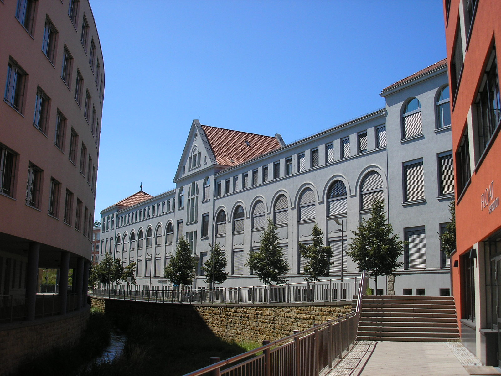 Das ehemalige Optima-Büromaschinenwerk in Erfurt.